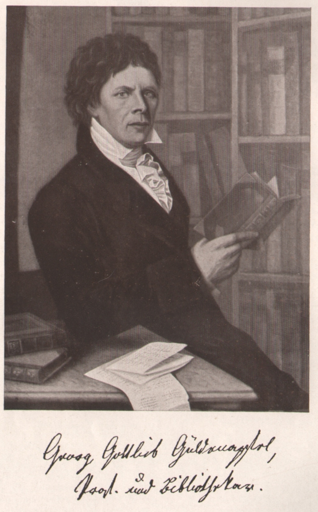 Portrait des Georg Gottlieb Güldenapfel, Sammlungen der Jenaer Universitätsbibliothek